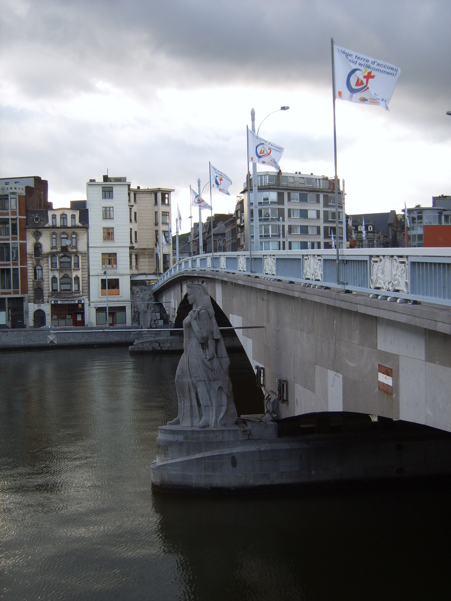 Arches bridge, Liège, Belgium